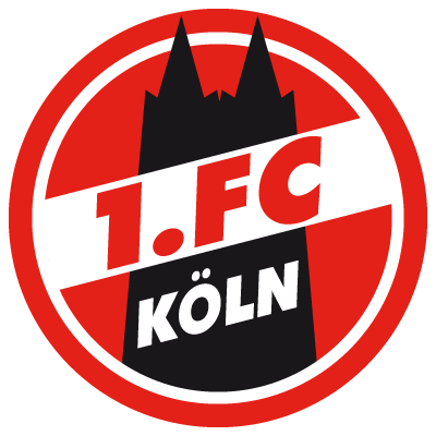 Escudo del 1. F.C. Colonia.